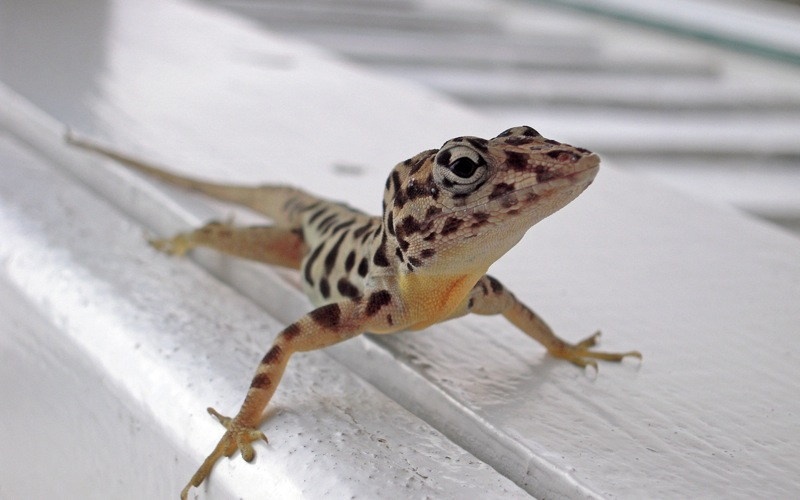 Saba Tree Lizard, Anolis sabanus - an anole endemic to Saba.